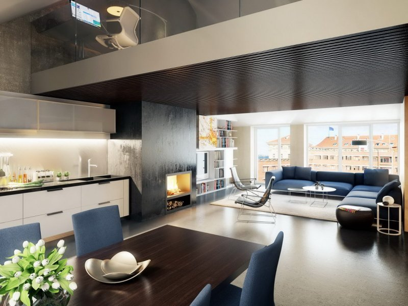 Obývací pokoj s krbem ve zrekonstruovaném pražském bytě. Praha 1, Keplerova 10. Vizualizace.